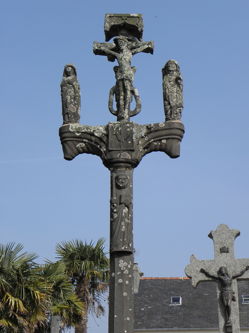 Calvaire de l'église Saint-Pierre-et-Saint-Paul d'Argol (29).